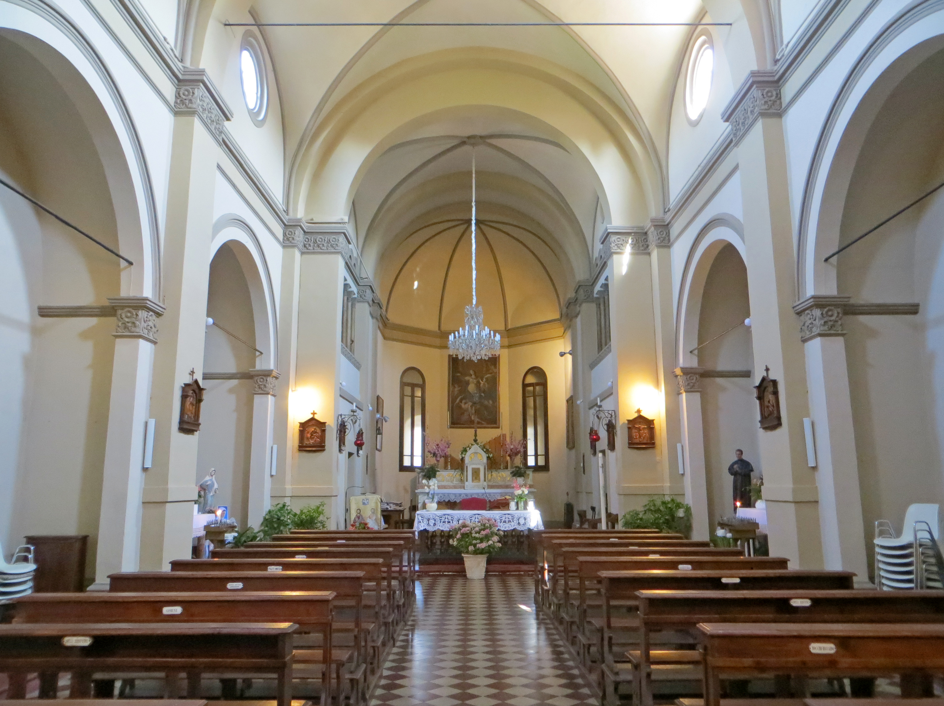 Chiesa di San Quintino (Montechiarugolo) - navata